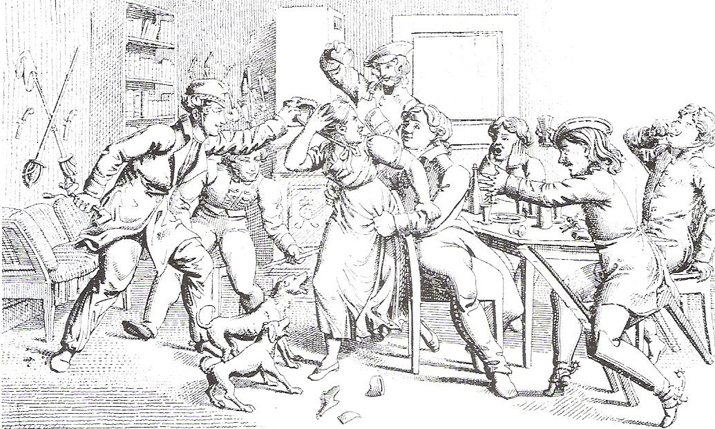 Aufwärterin - frühere Bezeichnung für weibliche Angestellte (Serviererin) in der Gastronomie, die mit der Bedienung von Gästen betraut war.